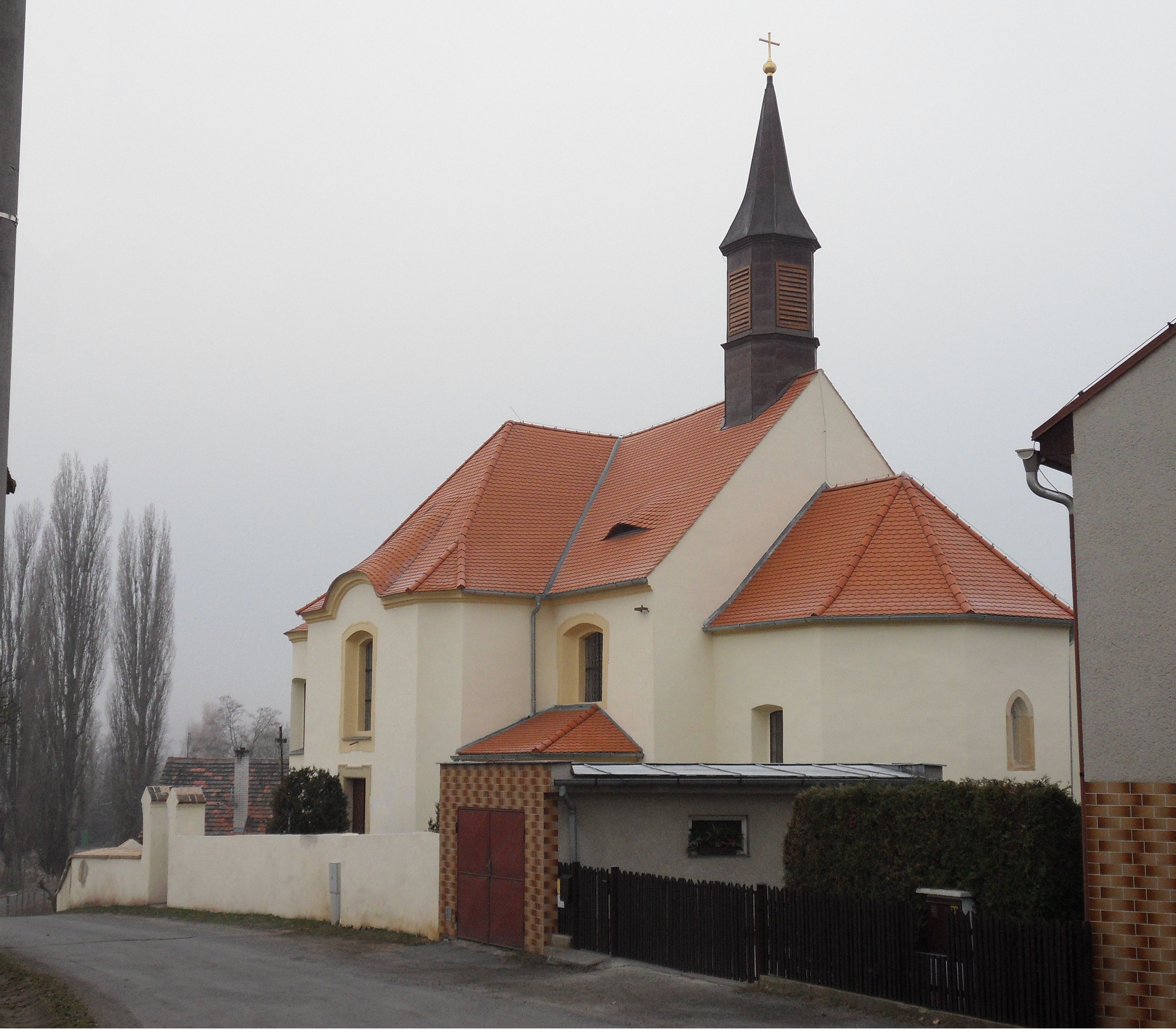 Kostel sv. Prokopa, (Nezdice okr.Plzeň-jih)